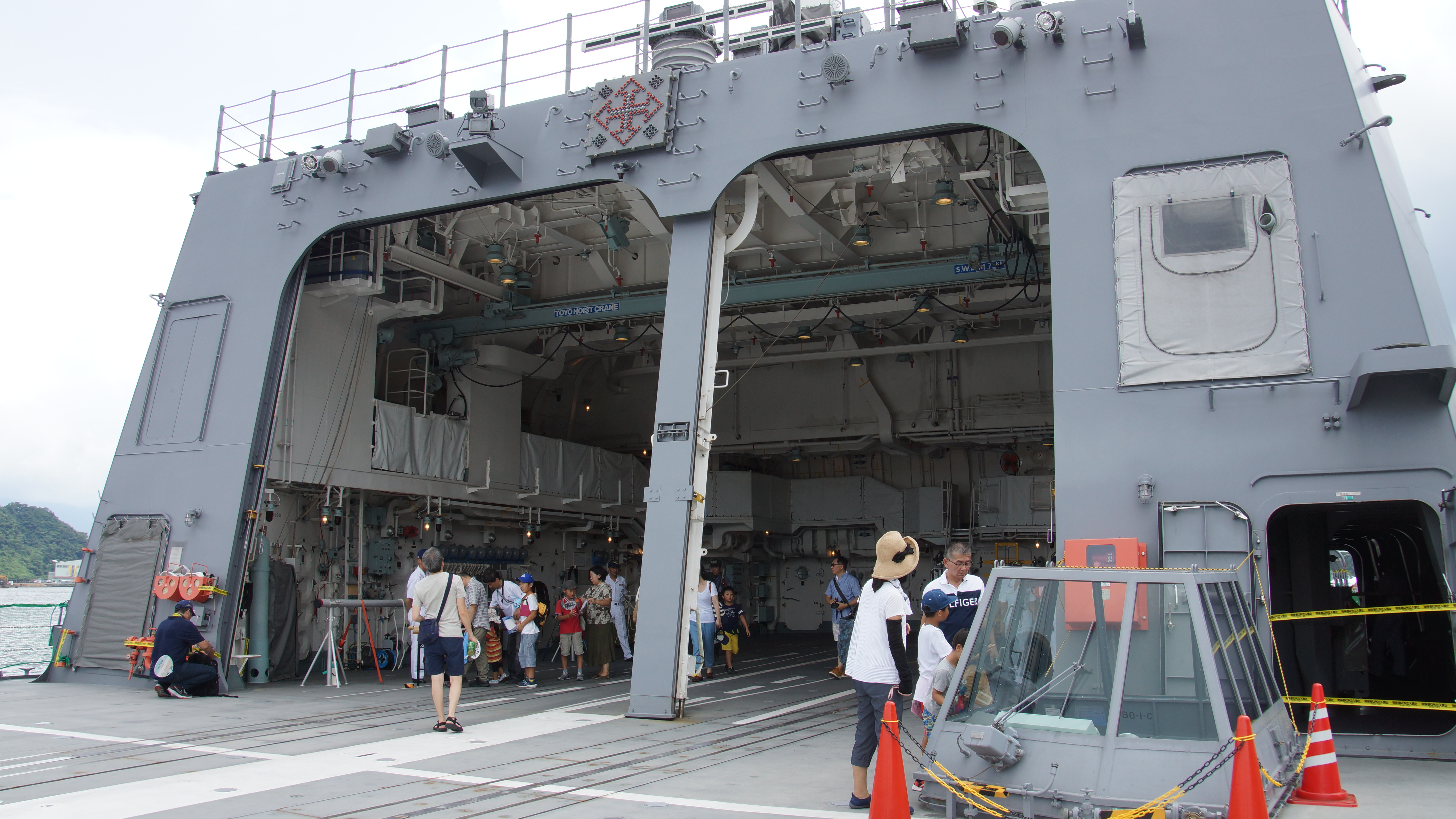 海上自衛隊 護衛艦ふゆづき（DD-118） 後部ヘリコプター格納庫扉。2017年7月29日 舞鶴基地にて。